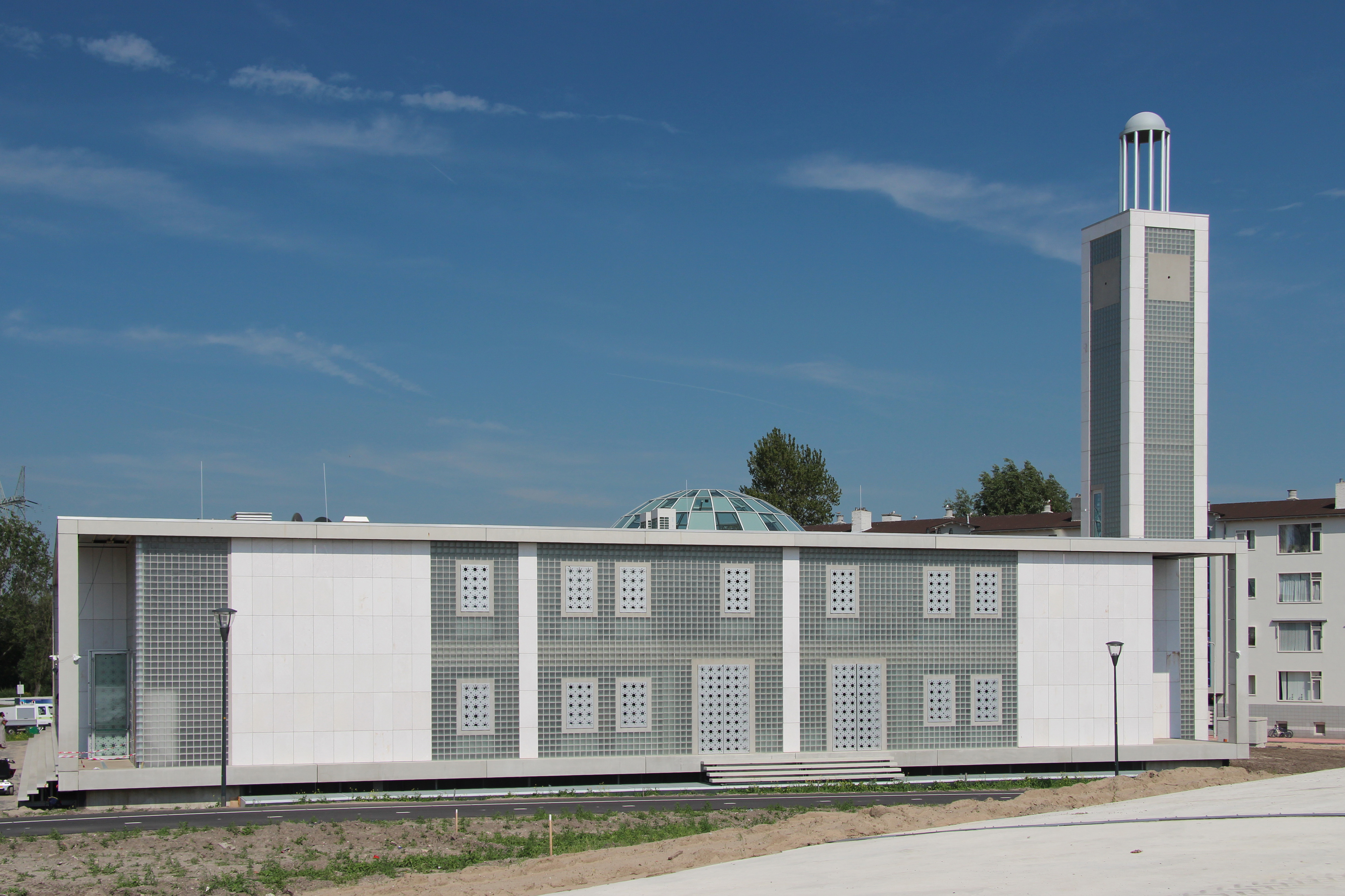 Moskee Islamitische Vereniging - Nieuwe Marnixstraat 80 Leiden - 2012. Tevens Islamitisch Centrum Imam Malik.